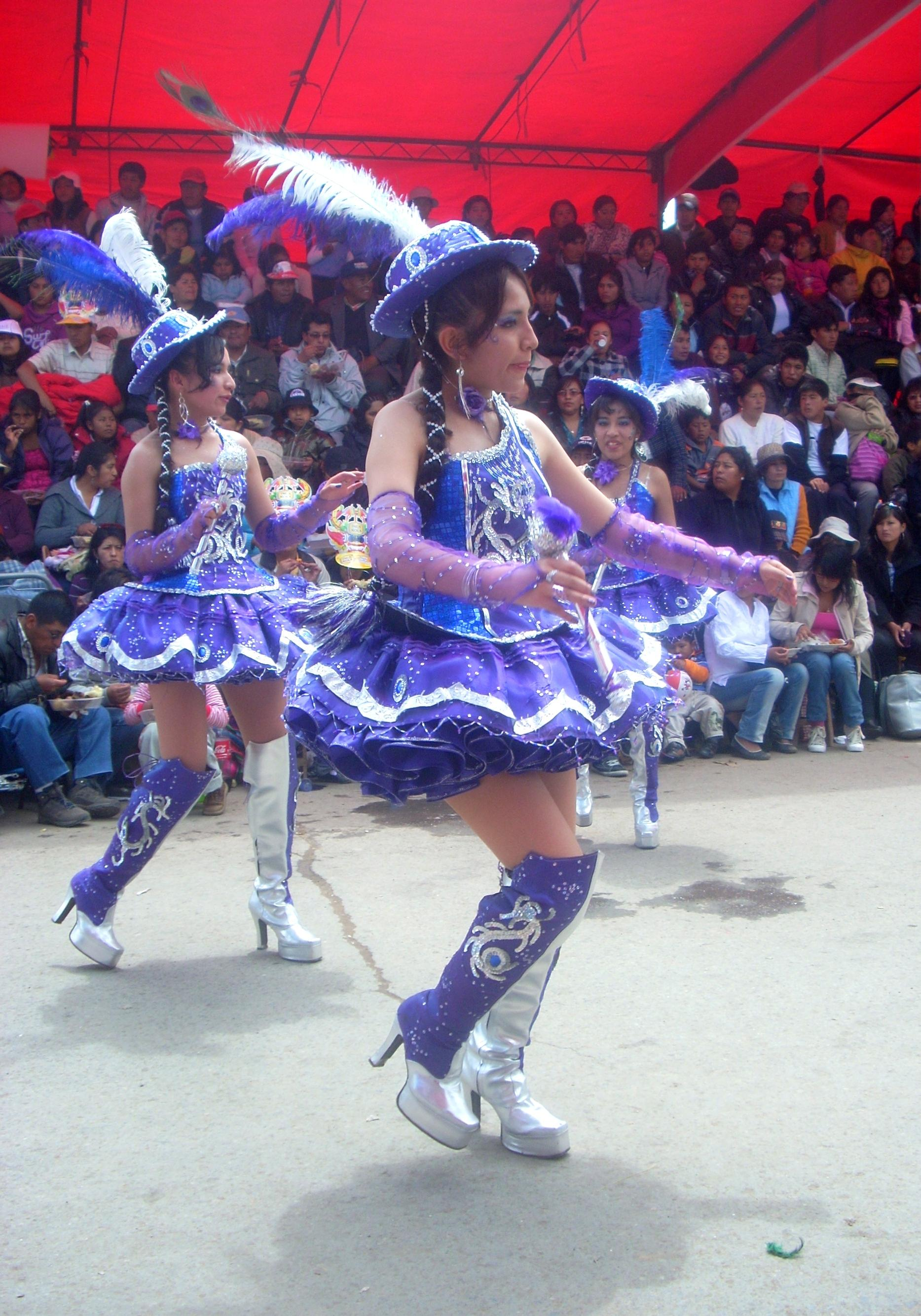 Festividad Candelaria De PUNO-PERU Danza: Morenada (Zona Aymara-Provincias)